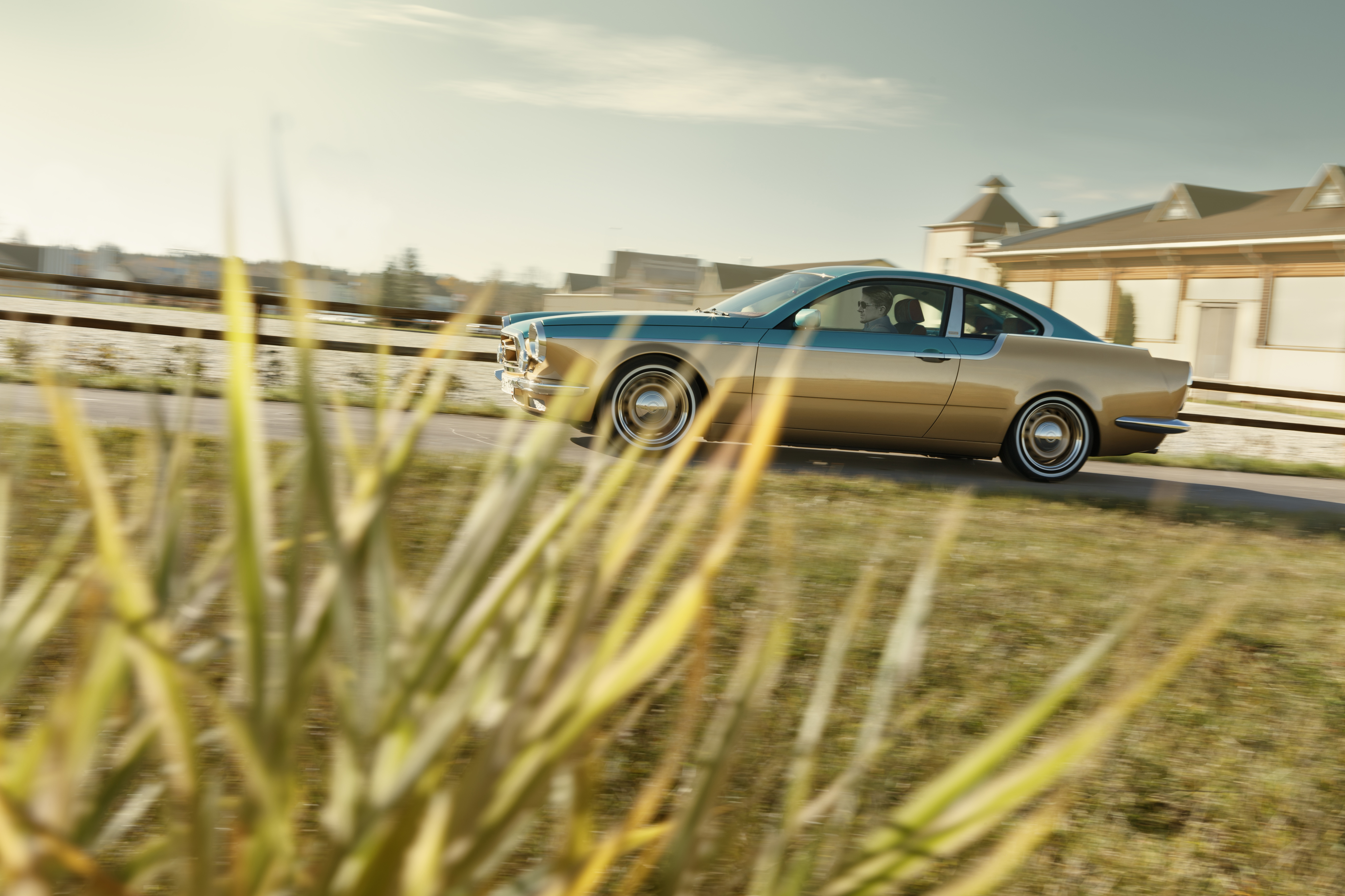 Первый автомобиль серии "Vintage"